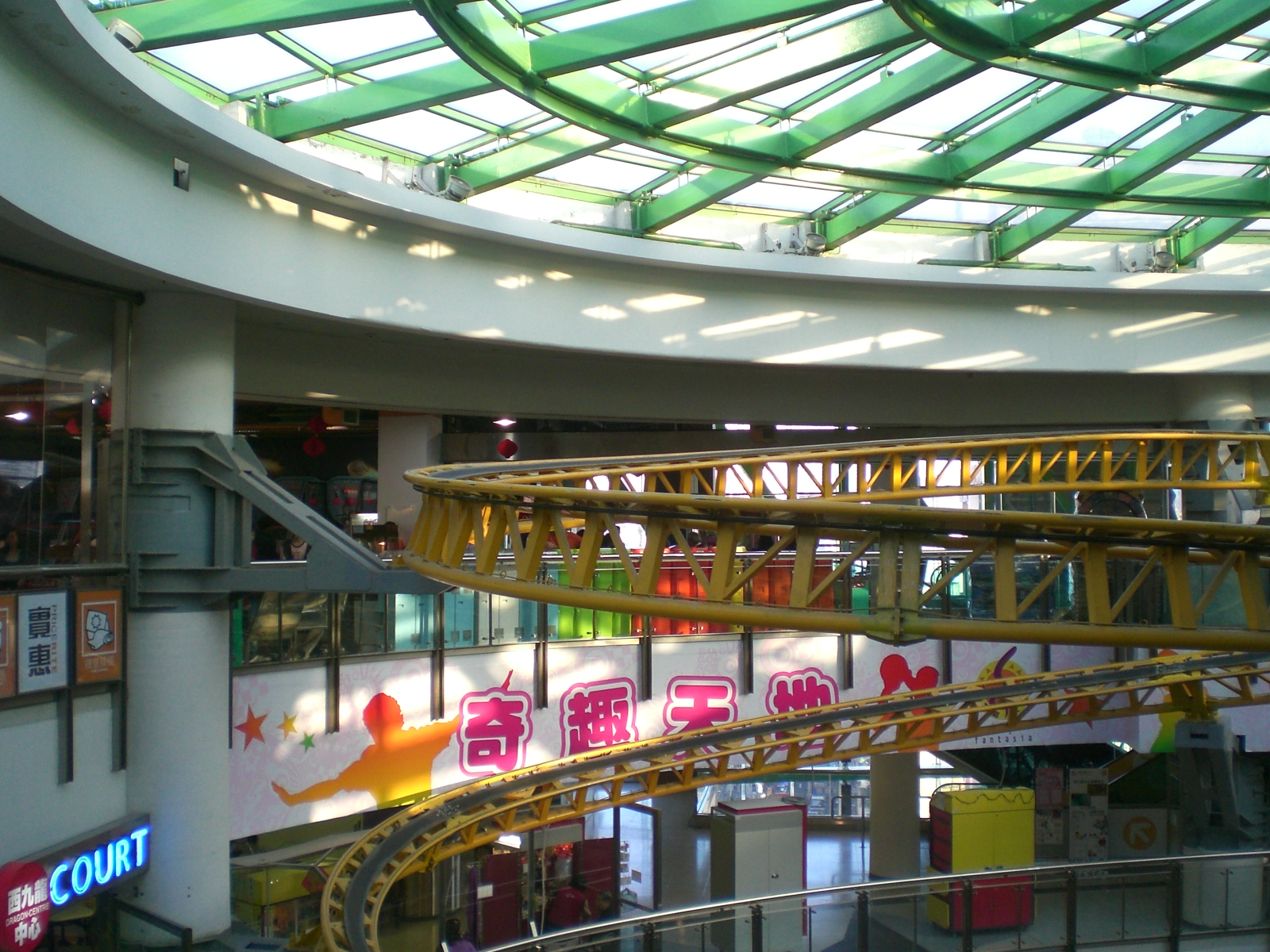 西九龍中心室內遊樂場奇趣天地及室內天龍過山車單軌鐵軌, Dragon Centre, Sham Shui Po, Kowloon, Hong Kong.